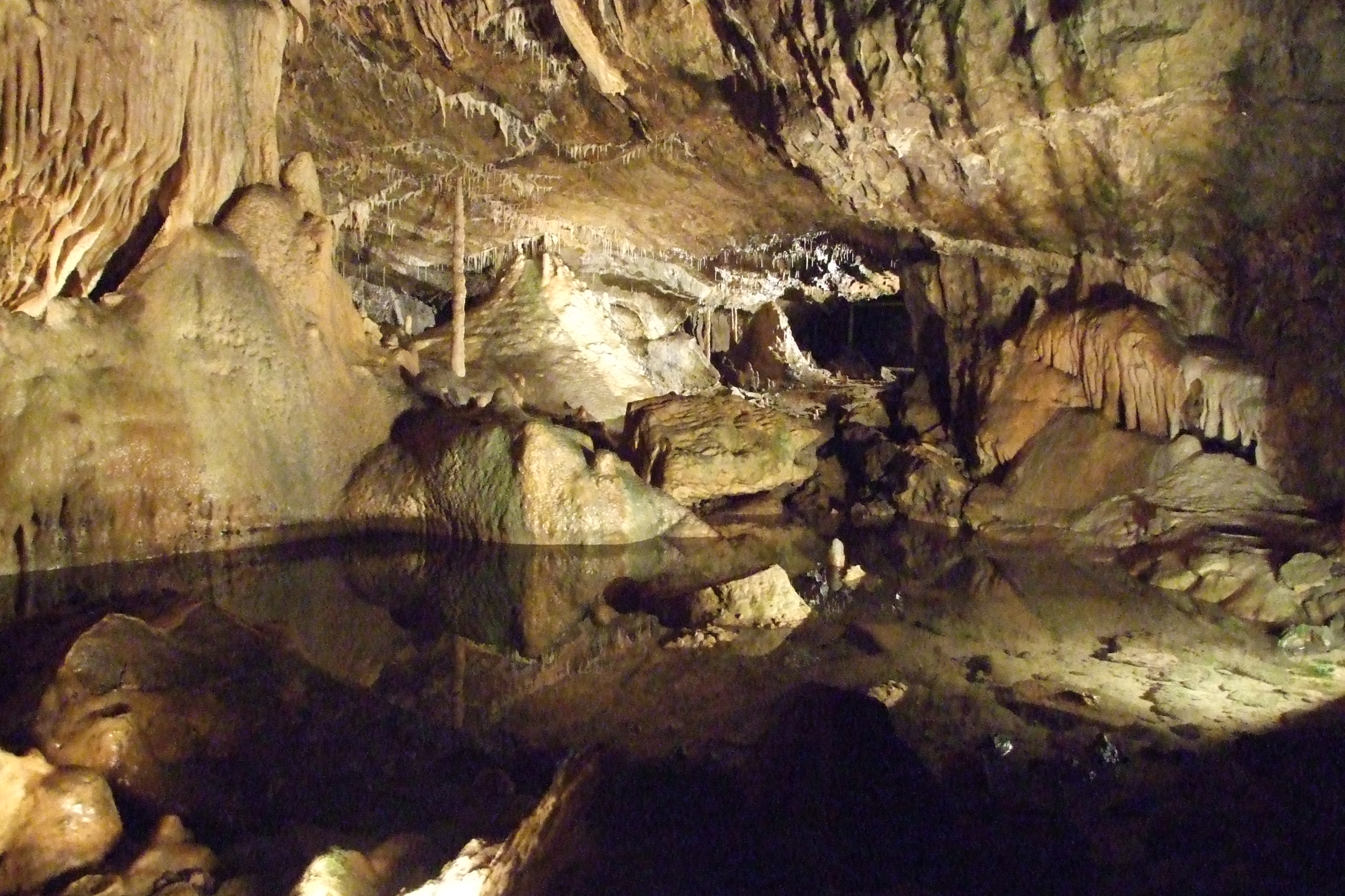 Hotton Caves, Hotton, Belgium